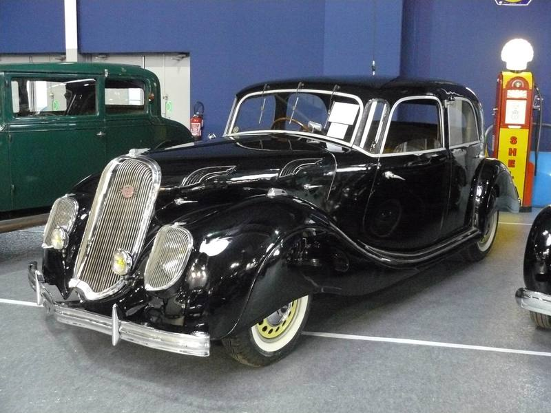 Retromobile 2012